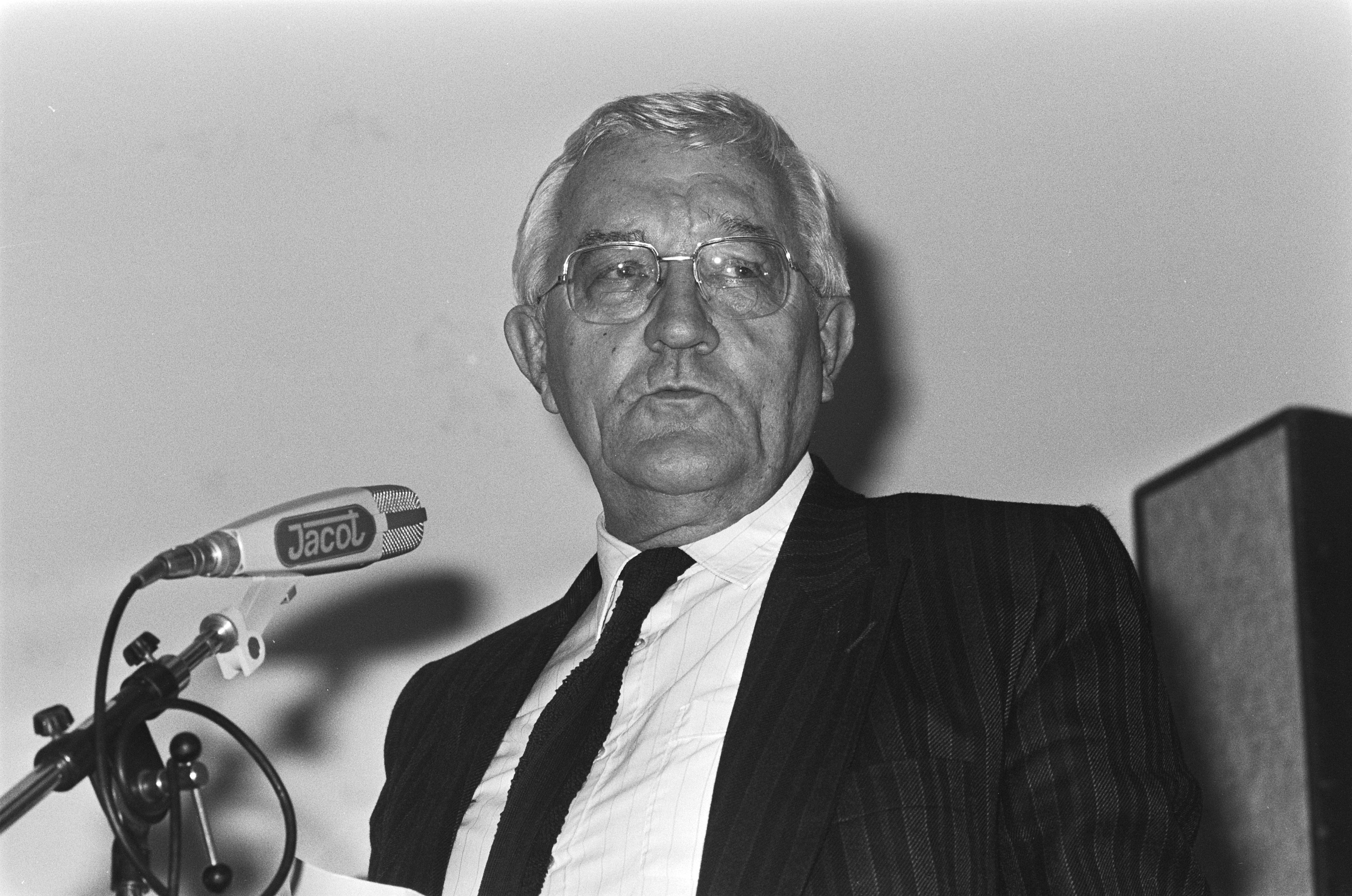 Collectie / Archief : Fotocollectie Anefo Reportage / Serie : [ onbekend ] Beschrijving : Jan Kassies opent tentoonstelling "100 jaar Prix de Rome" en maakt winnaars Prix de Rome 1985 bekend; Jan Kassies Datum : 9 september 1985 Trefwoorden : openingen, tentoonstellingen Persoonsnaam : Kassies Jan Instellingsnaam : Prix de Rome Fotograaf : Vollebregt, Sjakkelien / Anefo Auteursrechthebbende : Nationaal Archief Materiaalsoort : Negatief (zwart/wit) Nummer archiefinventaris : bekijk toegang 2.24.01.05 Bestanddeelnummer : 933-4171